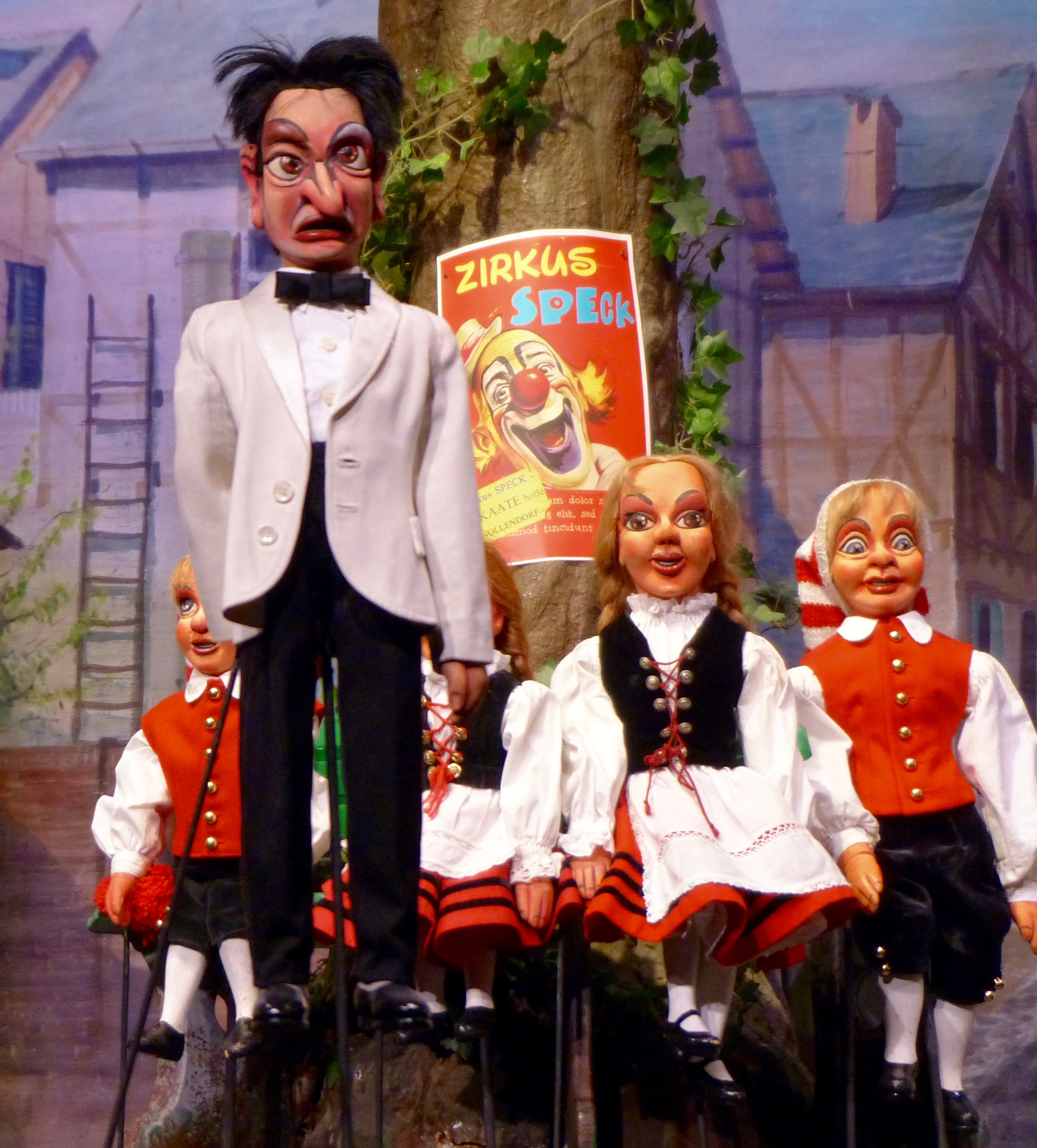 Hinger de Britz während der Hänneschen-Kirmes 2016: Schäl